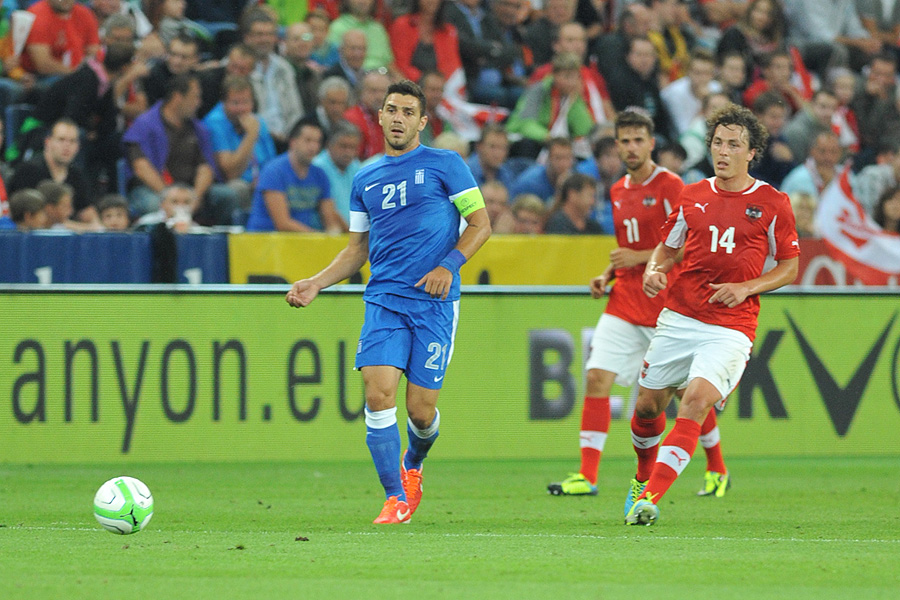 Freundschaftliches Länderspiel Österreich - Griechenland am 14. August 2013 in Salzburg: Kostas Katsouranis, Julian Baumgartlinger